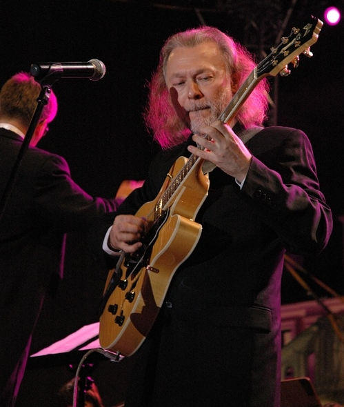 Marek Bałata, muzyk.